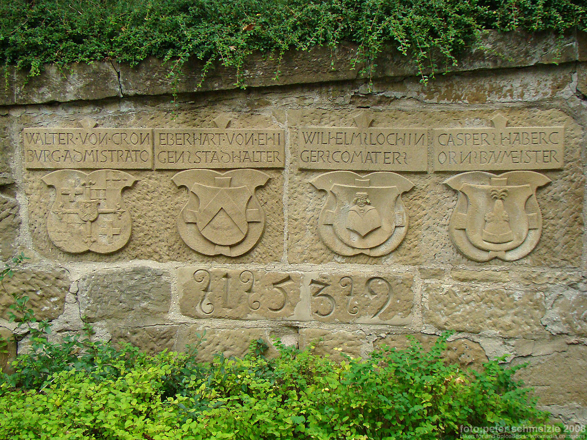 Wappensteine an einer Mauer bei der kath. Kirche/Deutschhof in Heilbronn-Sontheim